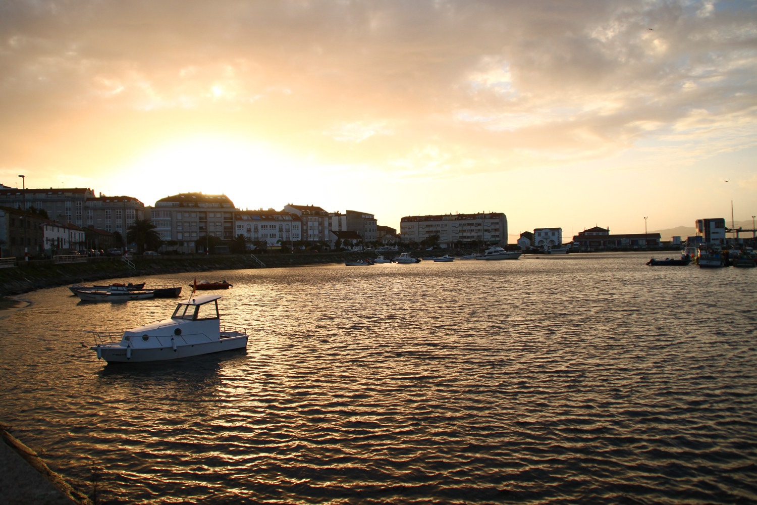 Portosin, pueblo del municipio de Puerto del Son (España)